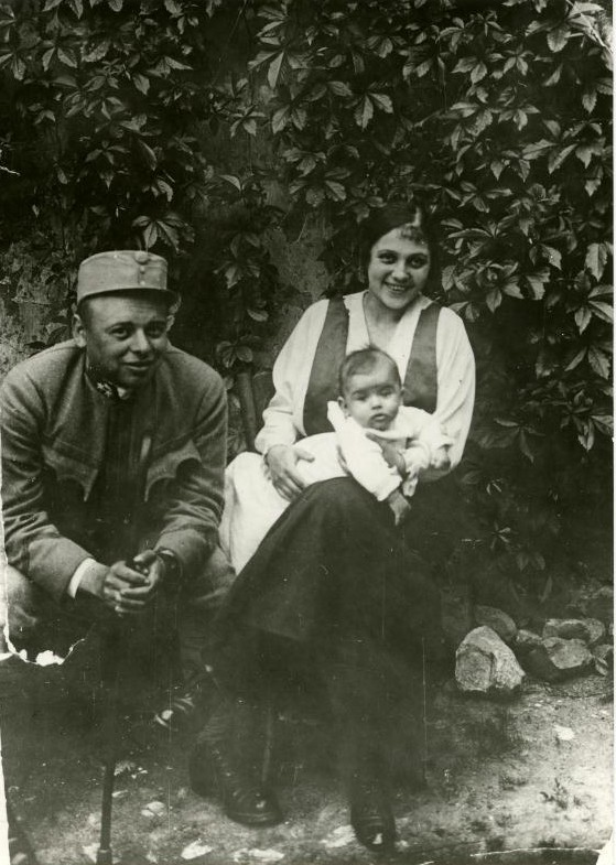 Béla Kun y familia en 1915.